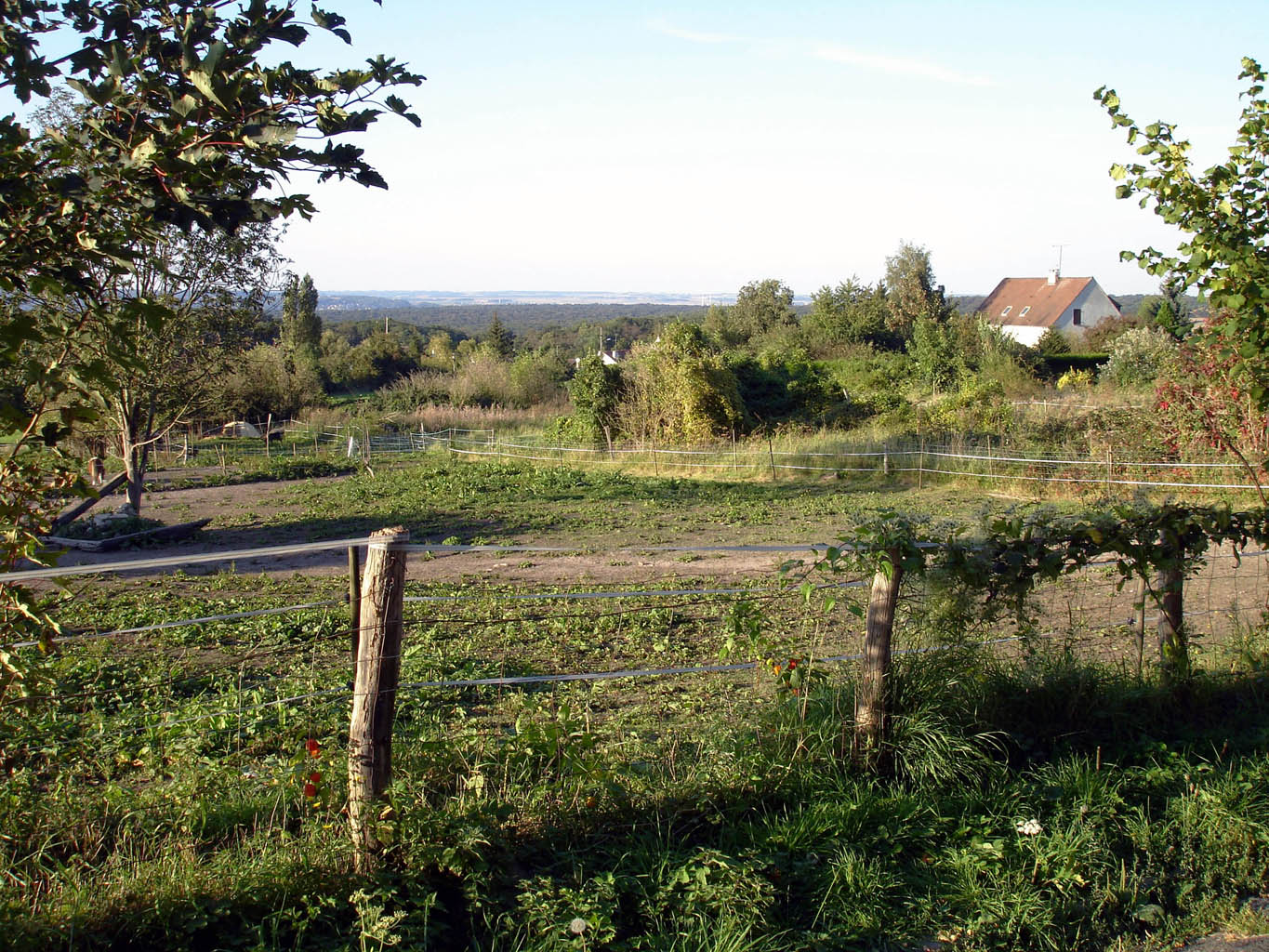 Vue de la forêt de L'Isle-Adam prise de Villiers-Adam (Val-d'Oise), France